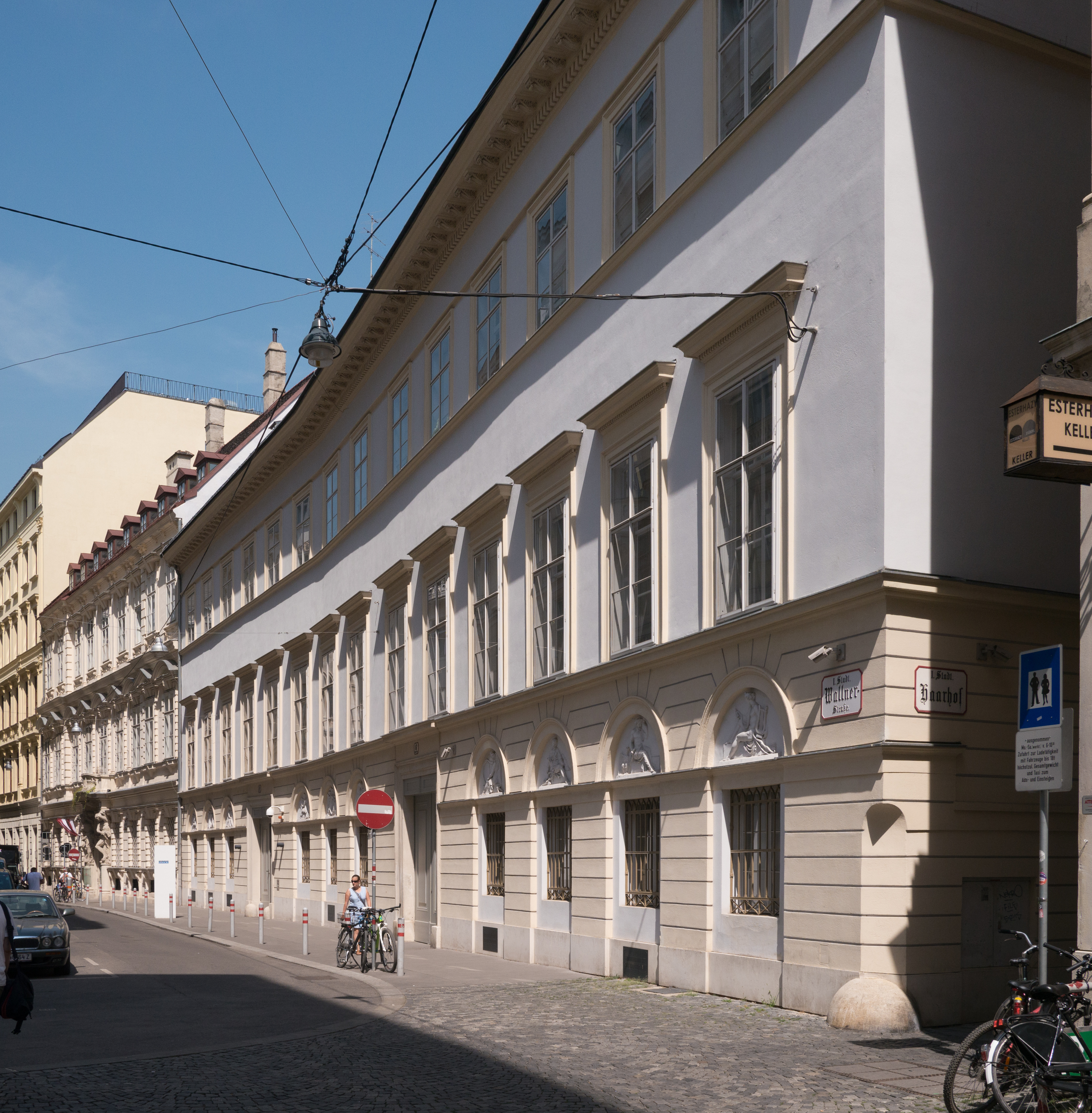 Ehem. Palais Pálffy, Staatsarchiv; Wallnerstraße 6